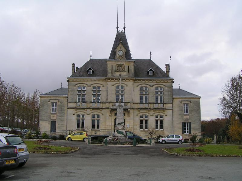 Mairie de Burie